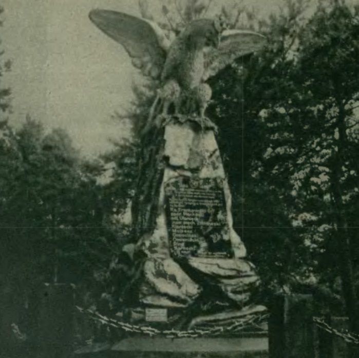 Pomnik Powstańców z roku 1863 W Krasnobrodzie. We wsi Krasnobród w pow. Zamojskim odsłonięto w tych dniach pomnik wybudowany na mogile poległych w 1863 r. powstańców. Pod Krasnobrodem odbyła się dnia 24 marca 1863 r. krwawa potyczka, w której zginęło 42 powstańców. Uroczystość odsłonięcia pomnika obchodzona była w Krasnobrodzie przez całą ludność i wszystkie związki pracy obywatelskiej.